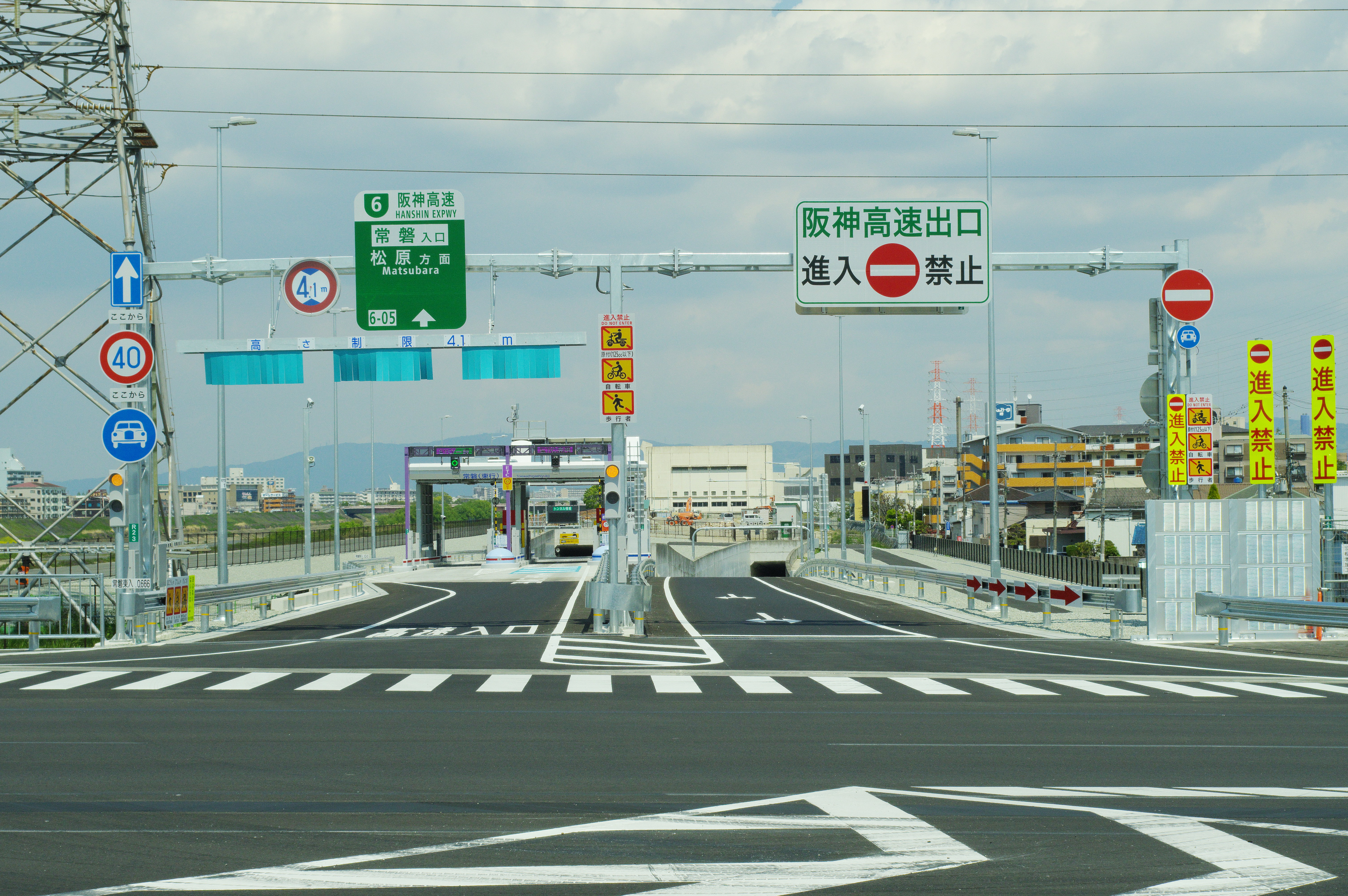 阪神高速6号大和川線 常磐出入口 東側 大阪府道28号大阪高石線 大阪府堺市北区常磐町